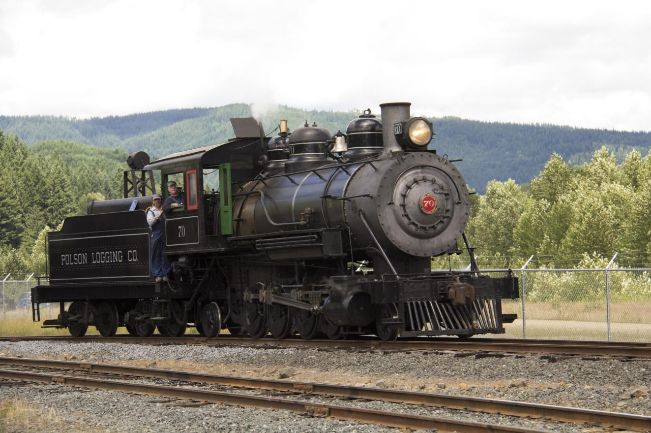 Number 70